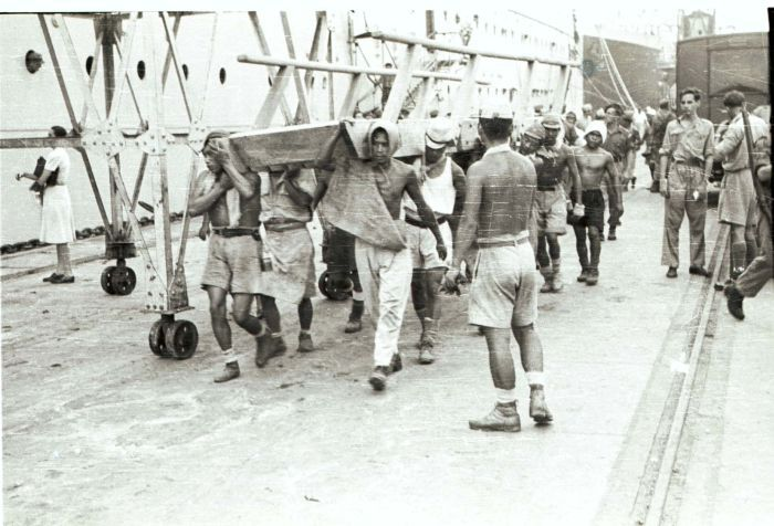 negatief. Het plaatsen van een loopbrug voor het troepenschip ms. Boissevain, door Japanse krijgsgevangenen , na aankomst in de haven van Tandjong Priok